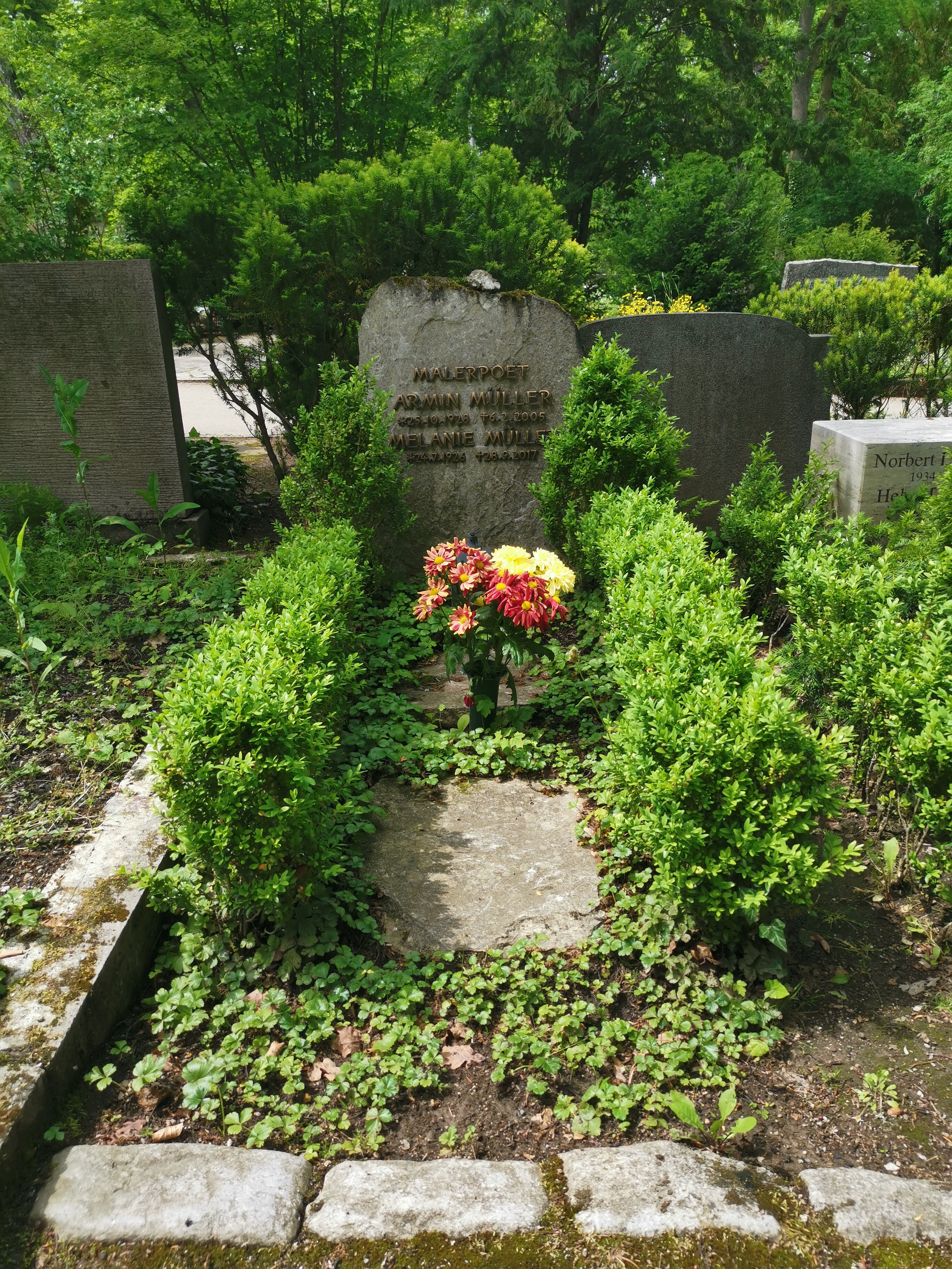 Grab des Malers Armin Müller; Historischer Friedhof Weimar